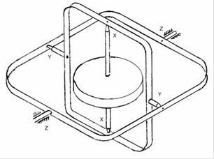 Роторен жироскоп в карданно окачване